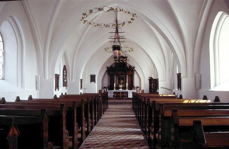 Egense Kirke i Danmark. Skibet set mod øst